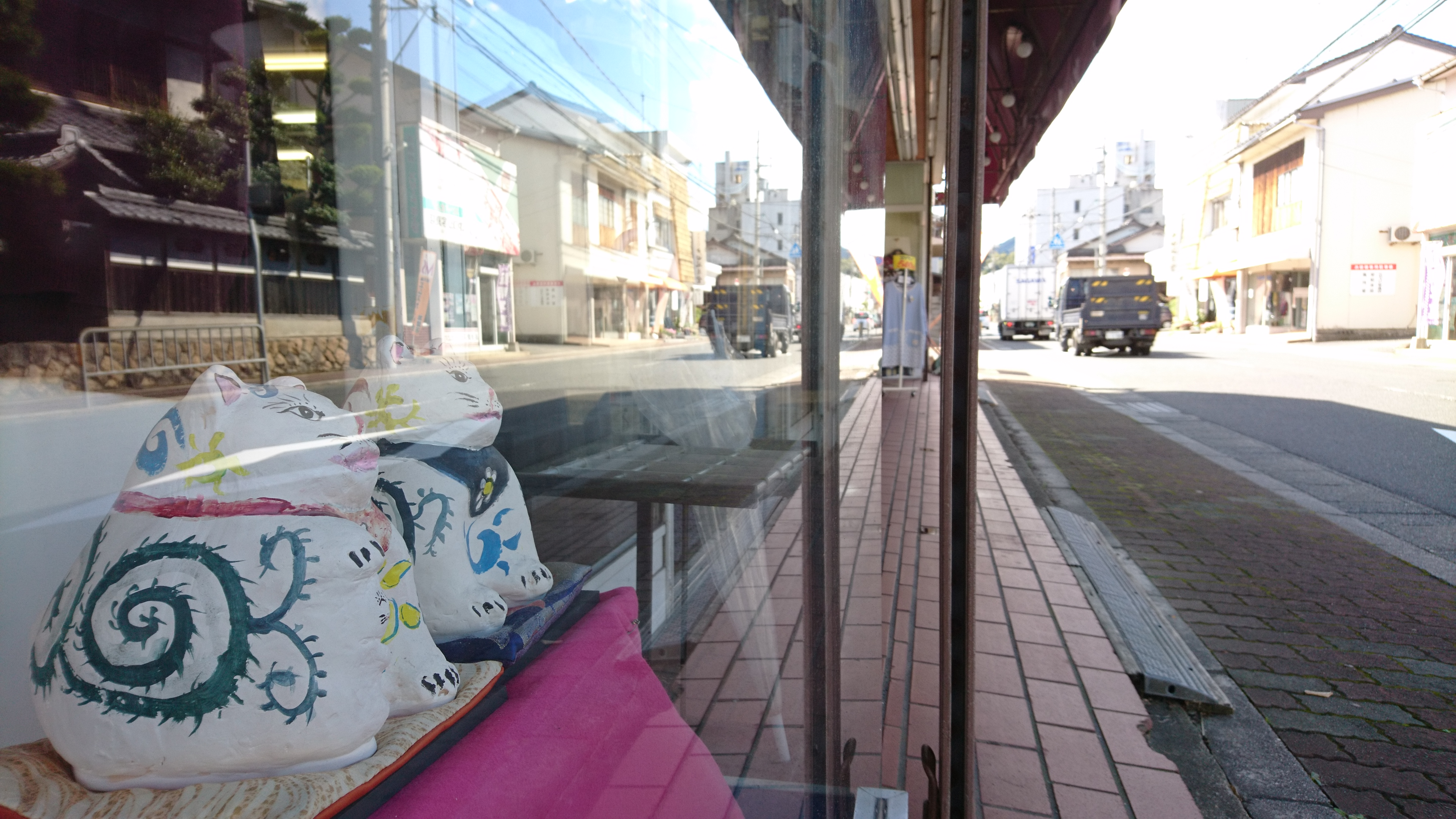 ショーウィンドーに飾られた絵付けこまねこ